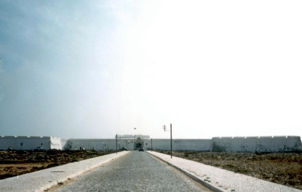 foto pessoal Fortaleza de Sagres, Algarve, Portugal